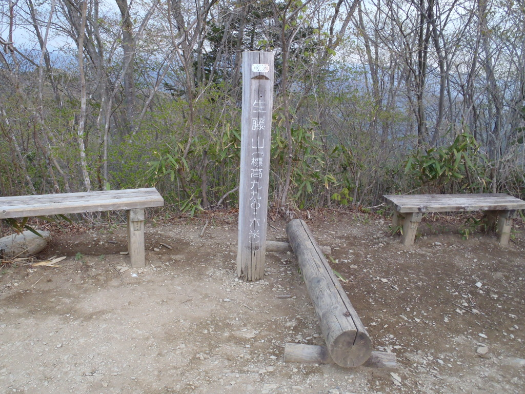 生藤山の山頂